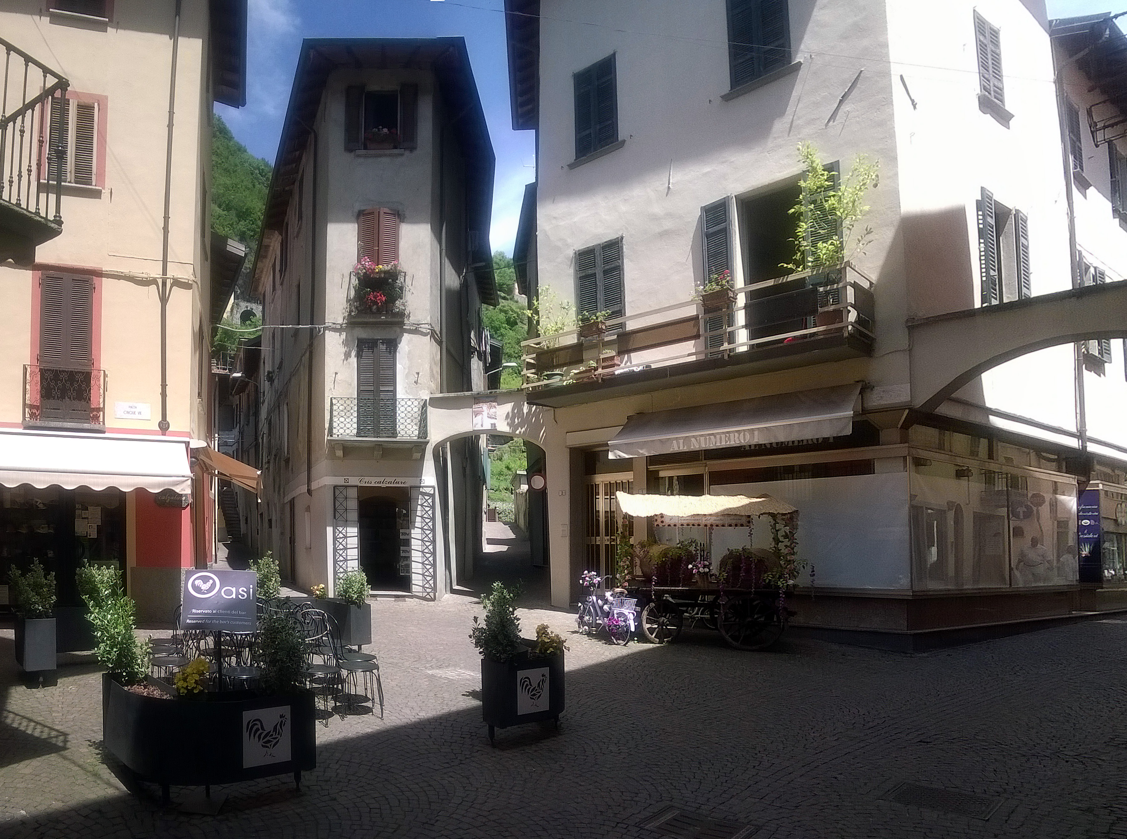 Panorama: Platz in Porlezza, Lombardei